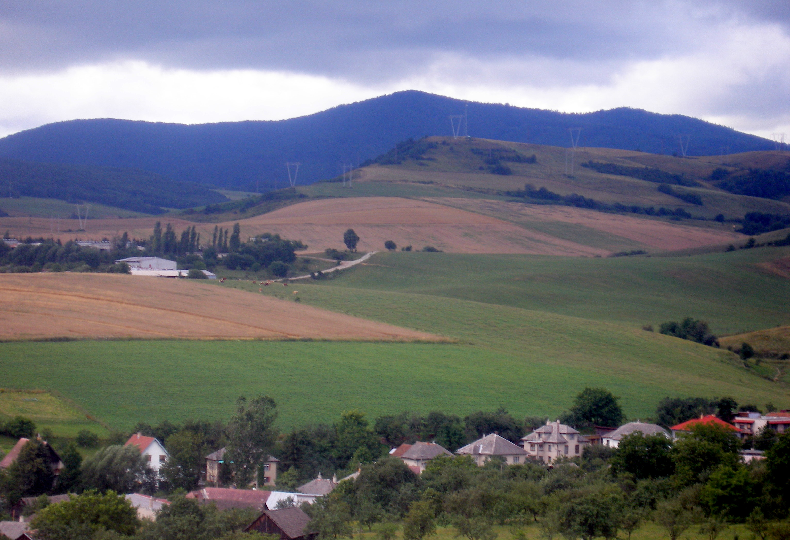 Obec Sedlice rok 2006 okres Prešov